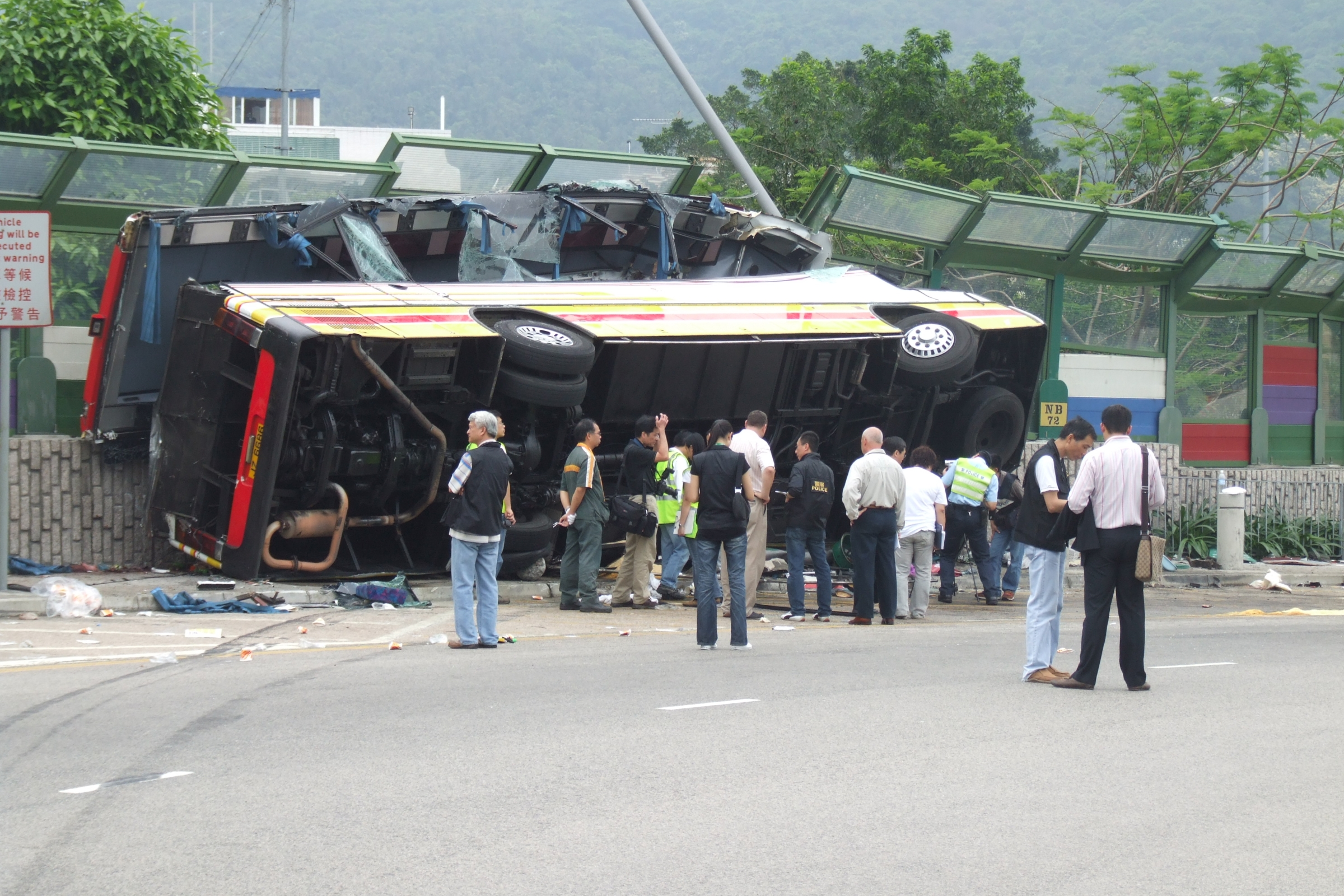 中文（香港）: 新西貢公路南邊圍迴旋處，伍氏兄弟旅運公司2001年五十鈴LT132P旅遊巴士JZ6686翻側事故現場。